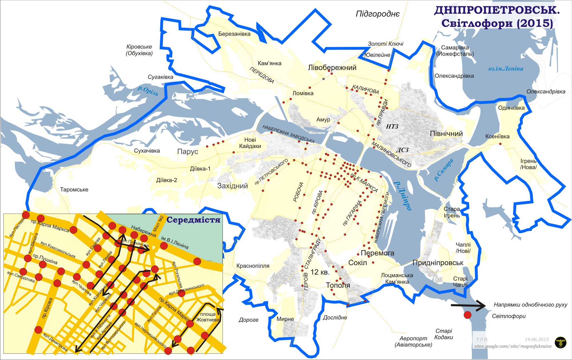 Схема світлофорів у м.Дніпропетровськ